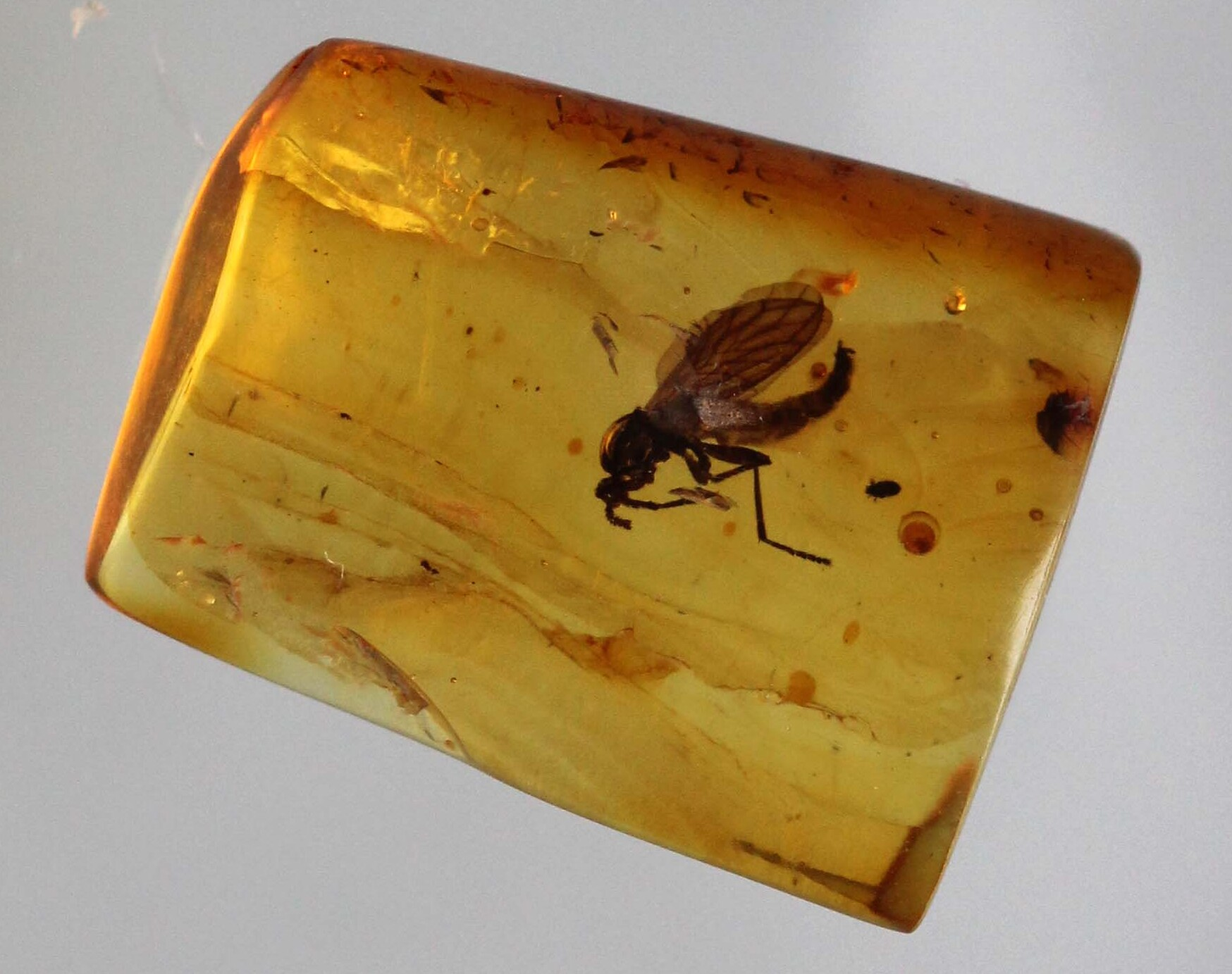 Ископаемое двукрылое насекомое (Diptera, Nematocera) в Балтийском янтаре. Возраст около 50 млн. лет